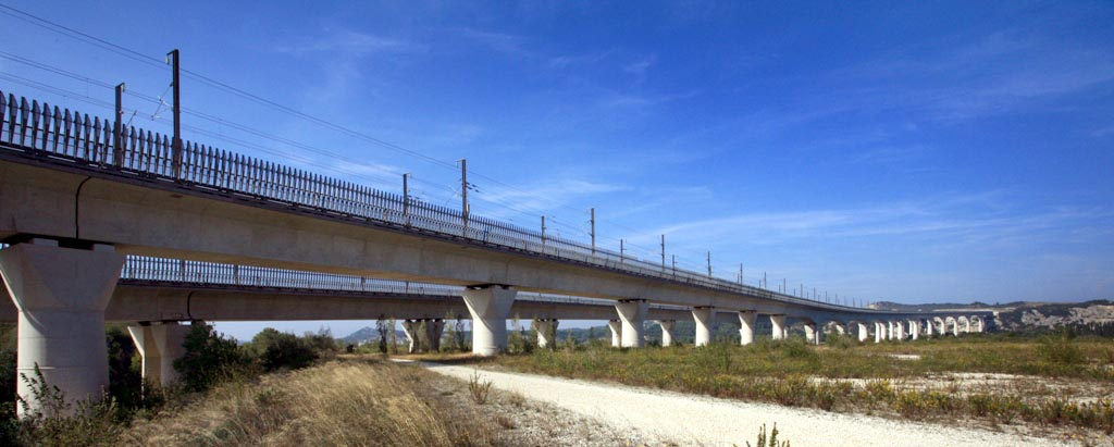 Bridge of the LGV railroad on the Rhone river next to Avignon (84), France Double viaduc du TGV Méditerranée sur le Rhône au sud d'Avignon.